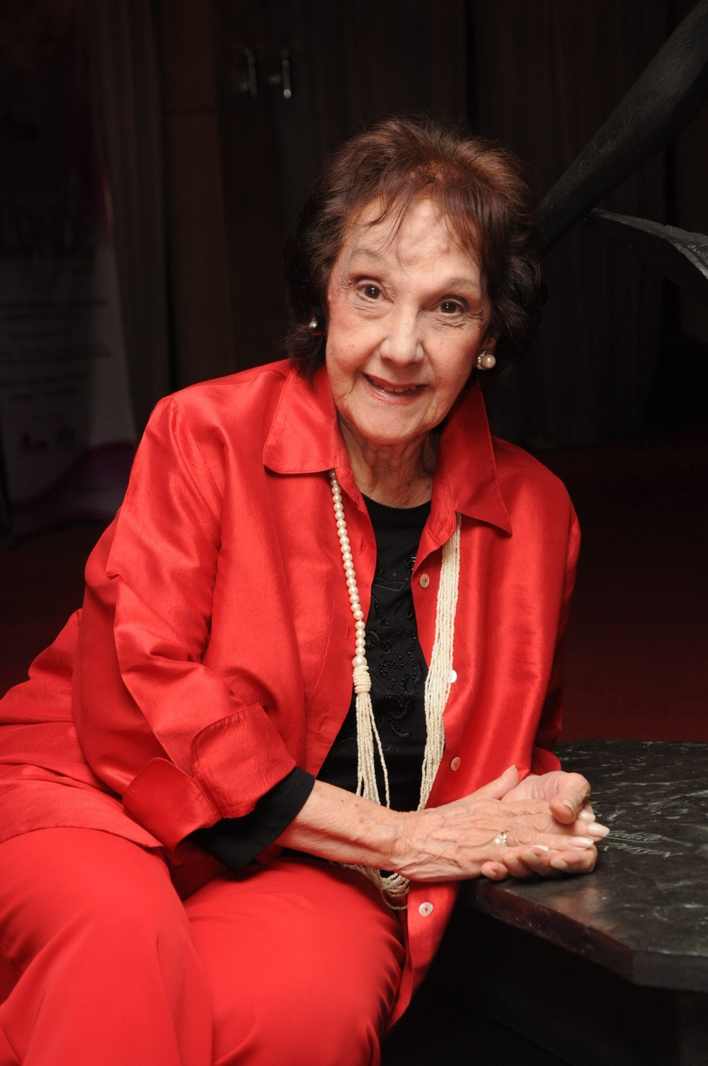 Flor de Bethania Abreu fotografiada en 2013